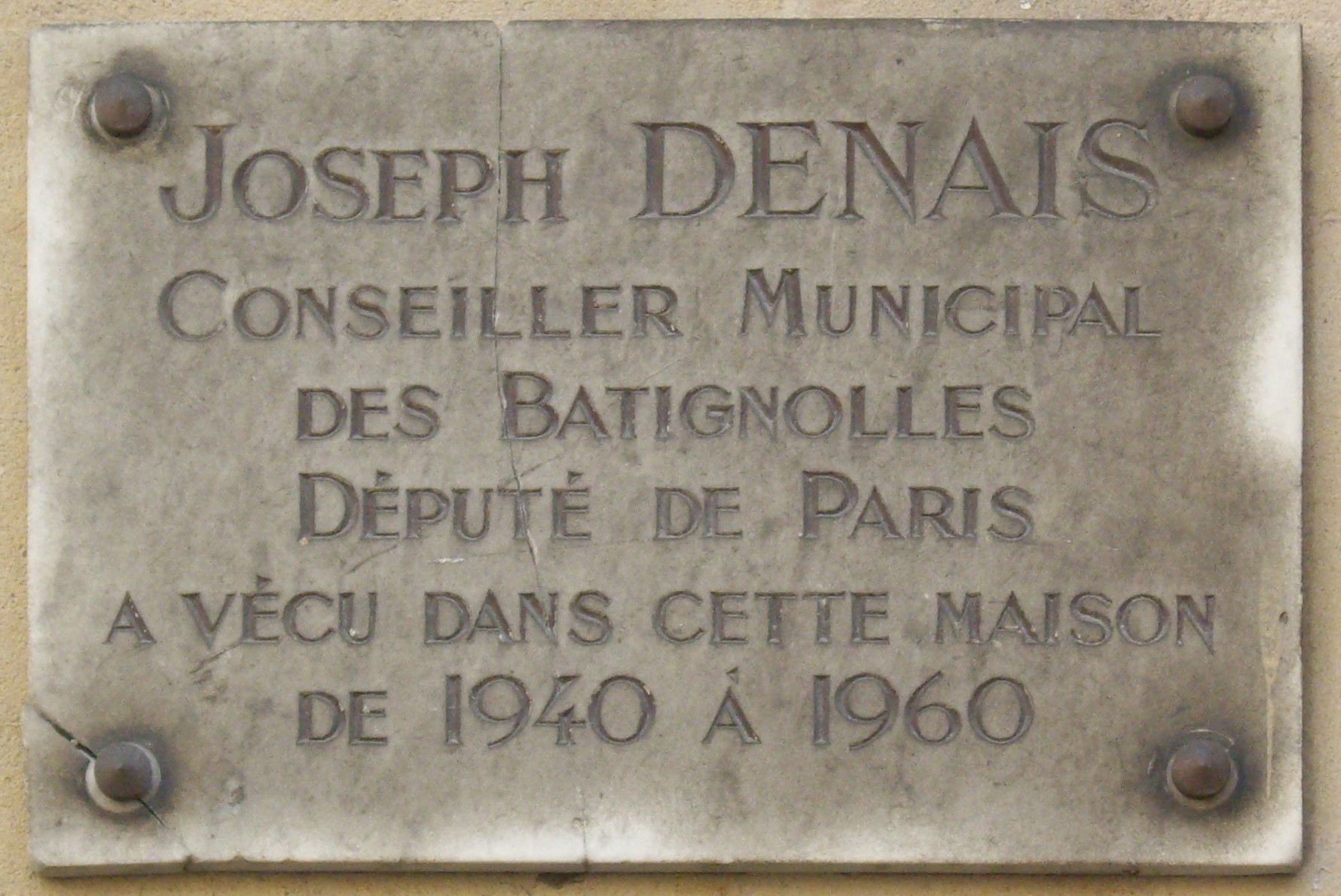 Plaque commémorative, 22 ter rue Legendre, Paris 17e. « Joseph Denais, conseiller municipal des Batignolles, député de Paris, a vécu dans cette maison de 1940 à 1960. »